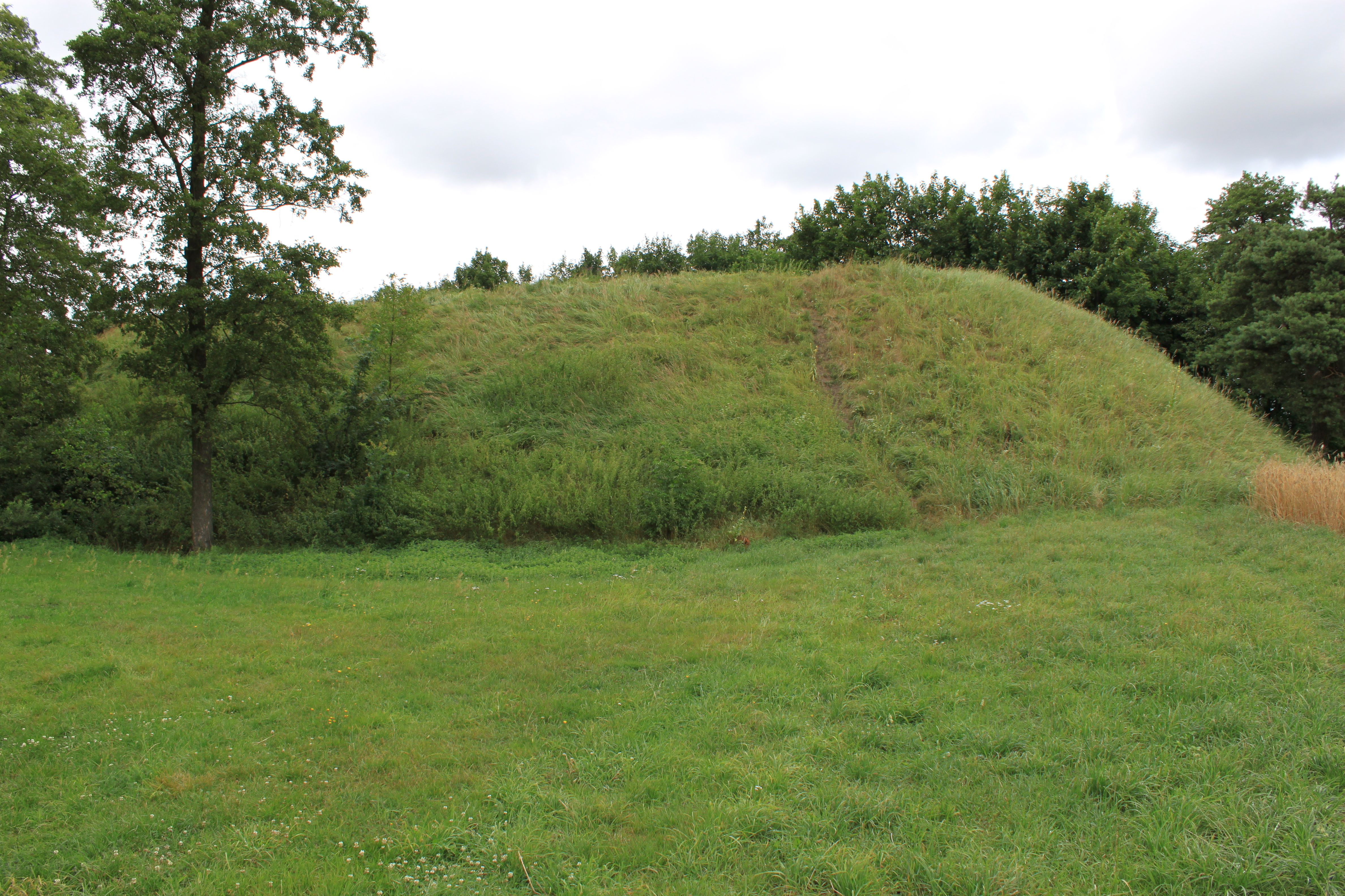 średniowieczne grodzisko nad jeziorem Księte